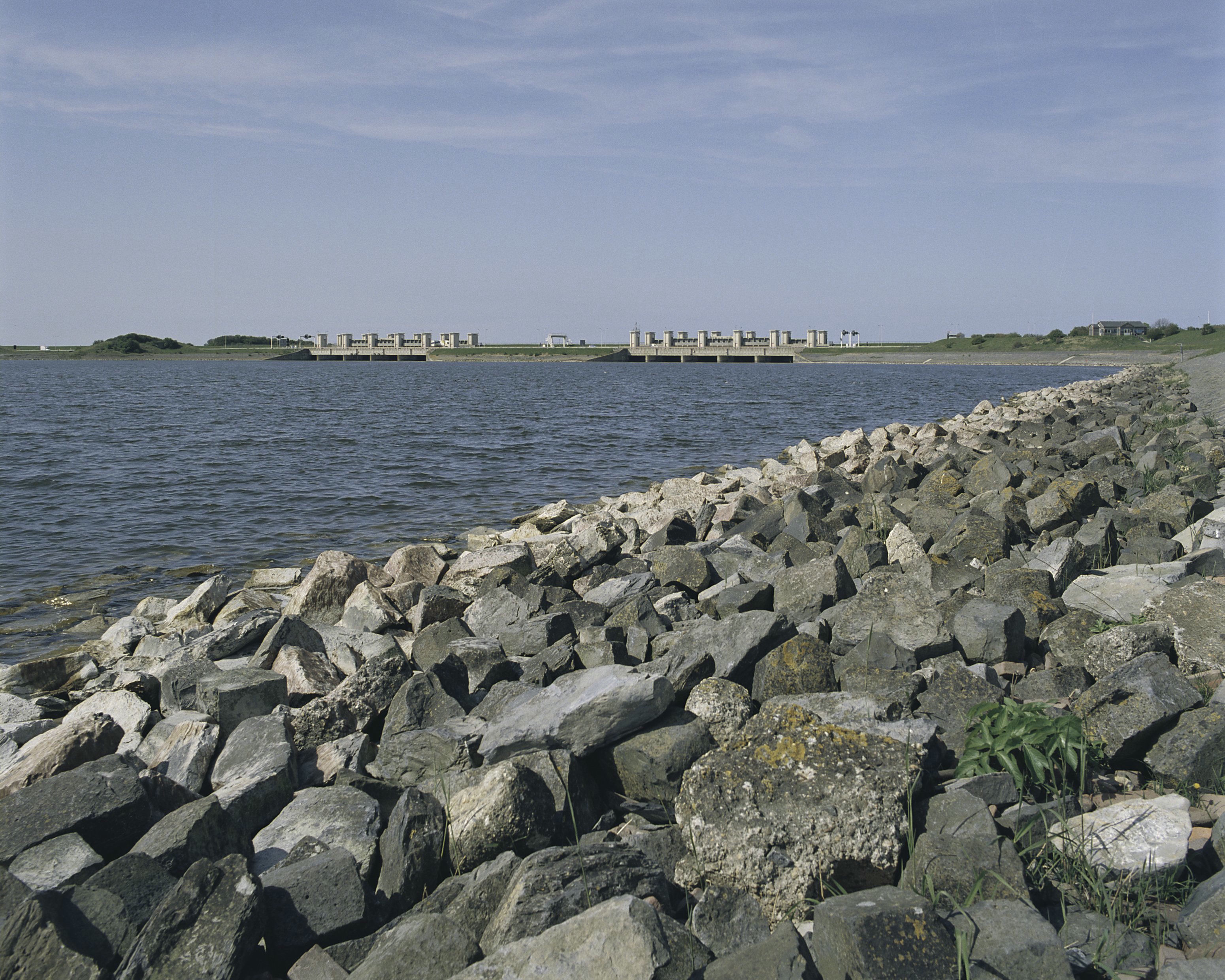 De Lorenzsluizen: Zicht op de spuisluizen in de spuihaven